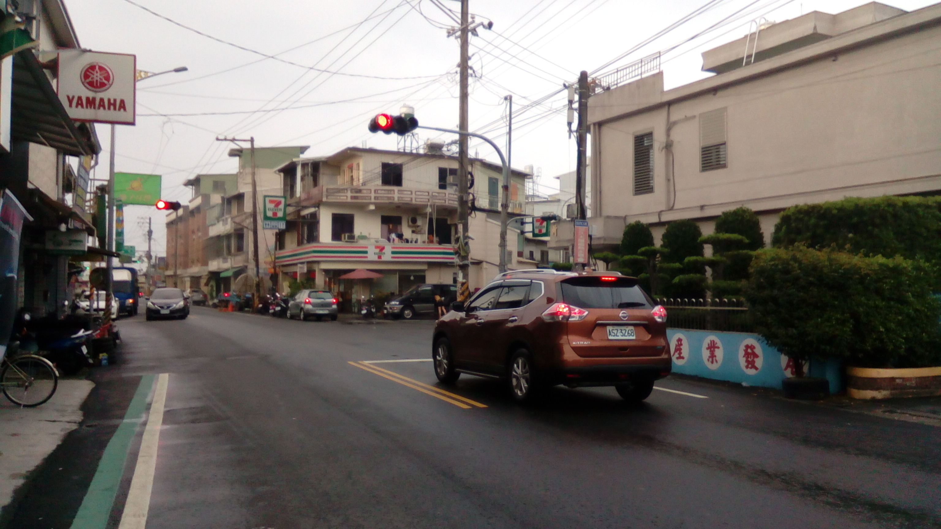 鄉公所前